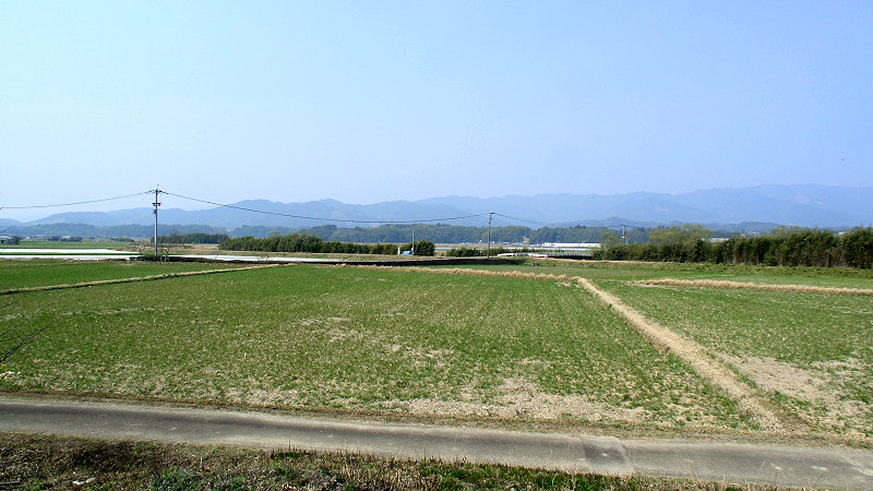 くま川鉄道湯前線ja:公立病院前駅 駅周辺 ホーム上から北西側を見る。 中央の樹木の向こうがja:柳橋川、さらに向こうにja:球磨川がある。 撮影者/著者/著作権保有者 : MK Products (本人がアップロード) 撮影日 : 2007/03/22 公立病院前駅用にアップロードした画像です。良い画像があれば別の画像に変えてください。